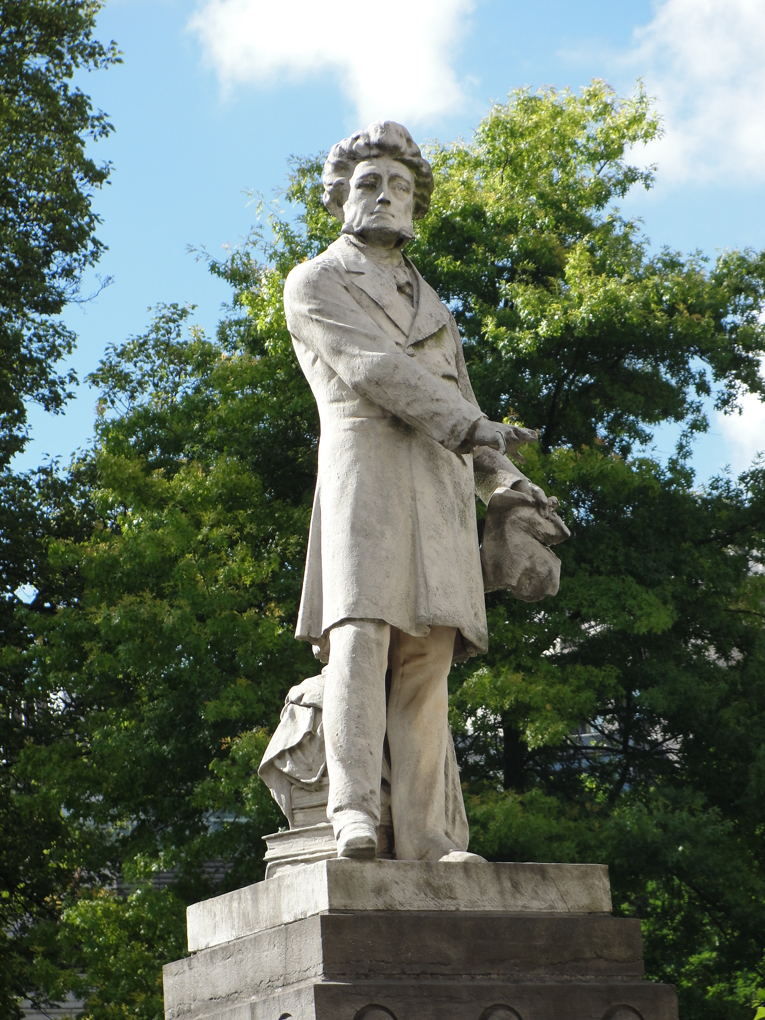 Standbeeld van Alexandre Gendebien door Charles Van der Stappen, onthuld in 1874. Stond oorspronkelijk op het Gerechtsplein (locatie van het oude Justitiepaleis), later verplaatst naar Frère-Orbansquare in de Leopoldswijk.